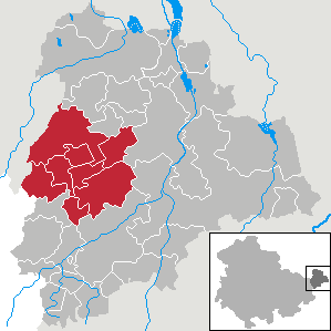 Verwaltungsgemeinschaft Altenburger Land in Thuringia - District Altenburger Land